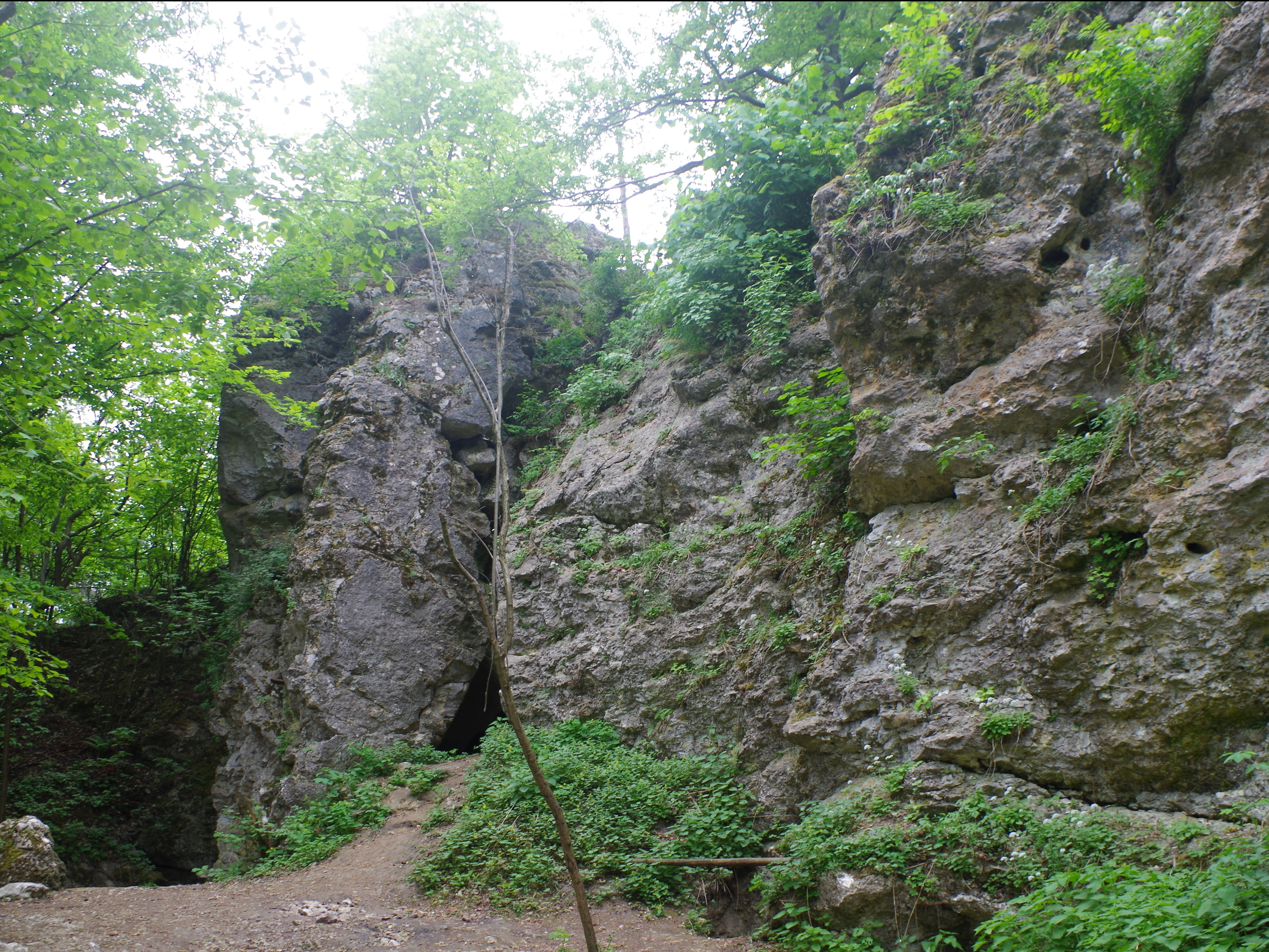 Skały Dudnik w Podlesicach